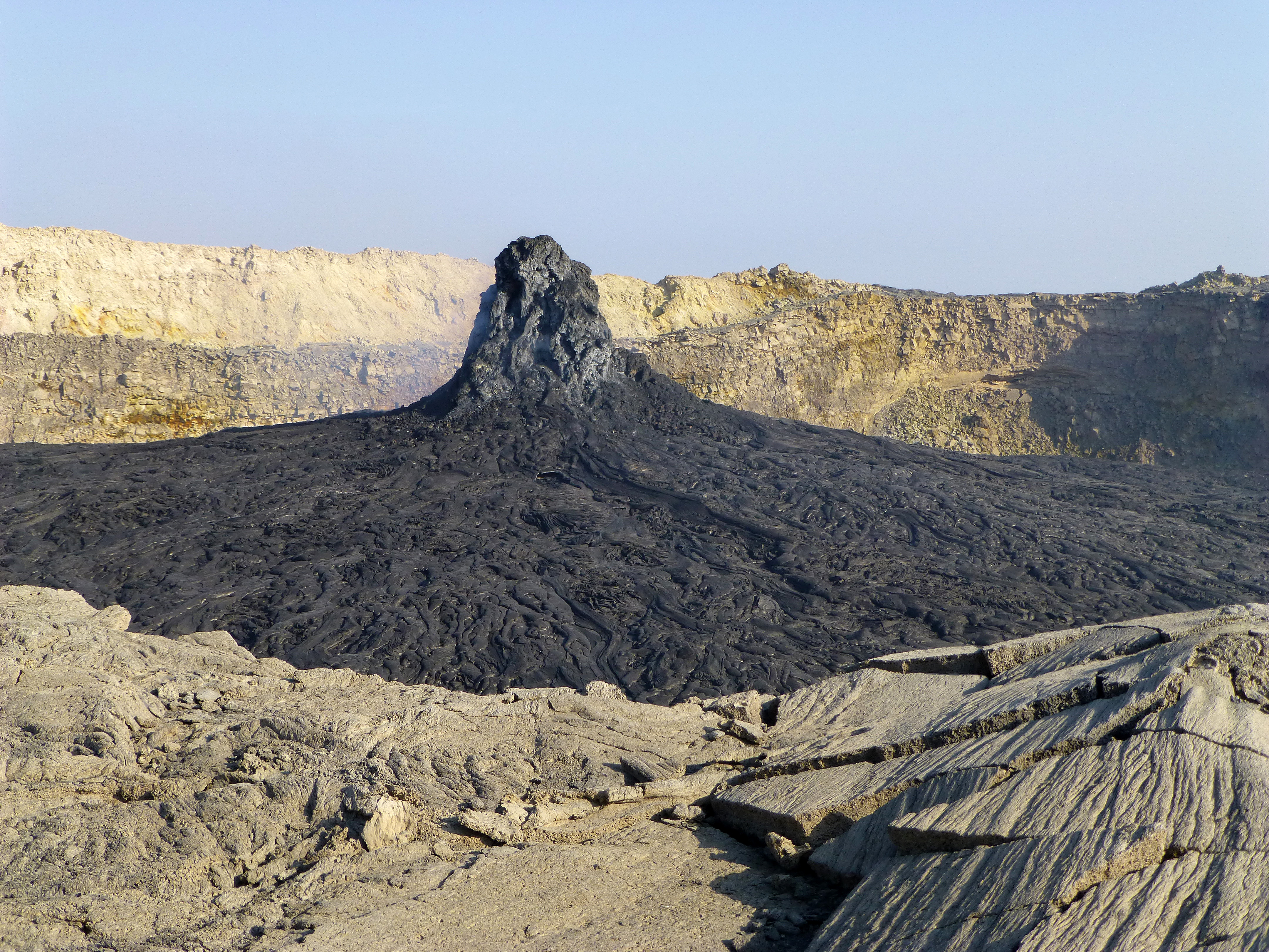 Erta Ale (Ethiopie) : deuxième cratère ; le cratère principal se trouve à droite (hors champ)